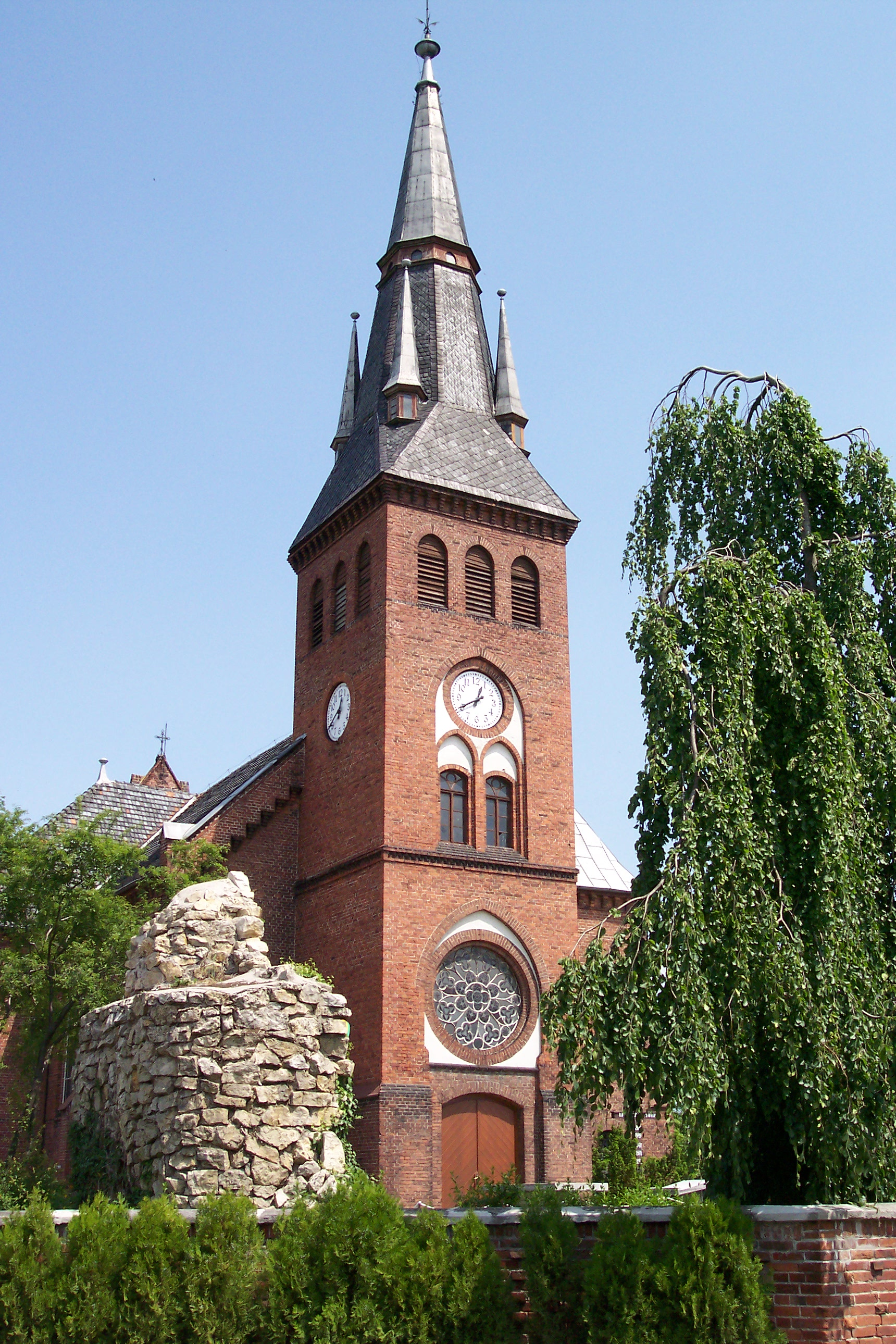 Kościół Niepokalanego Poczęcia NMP w Chrząstowicach (woj. opolskie)